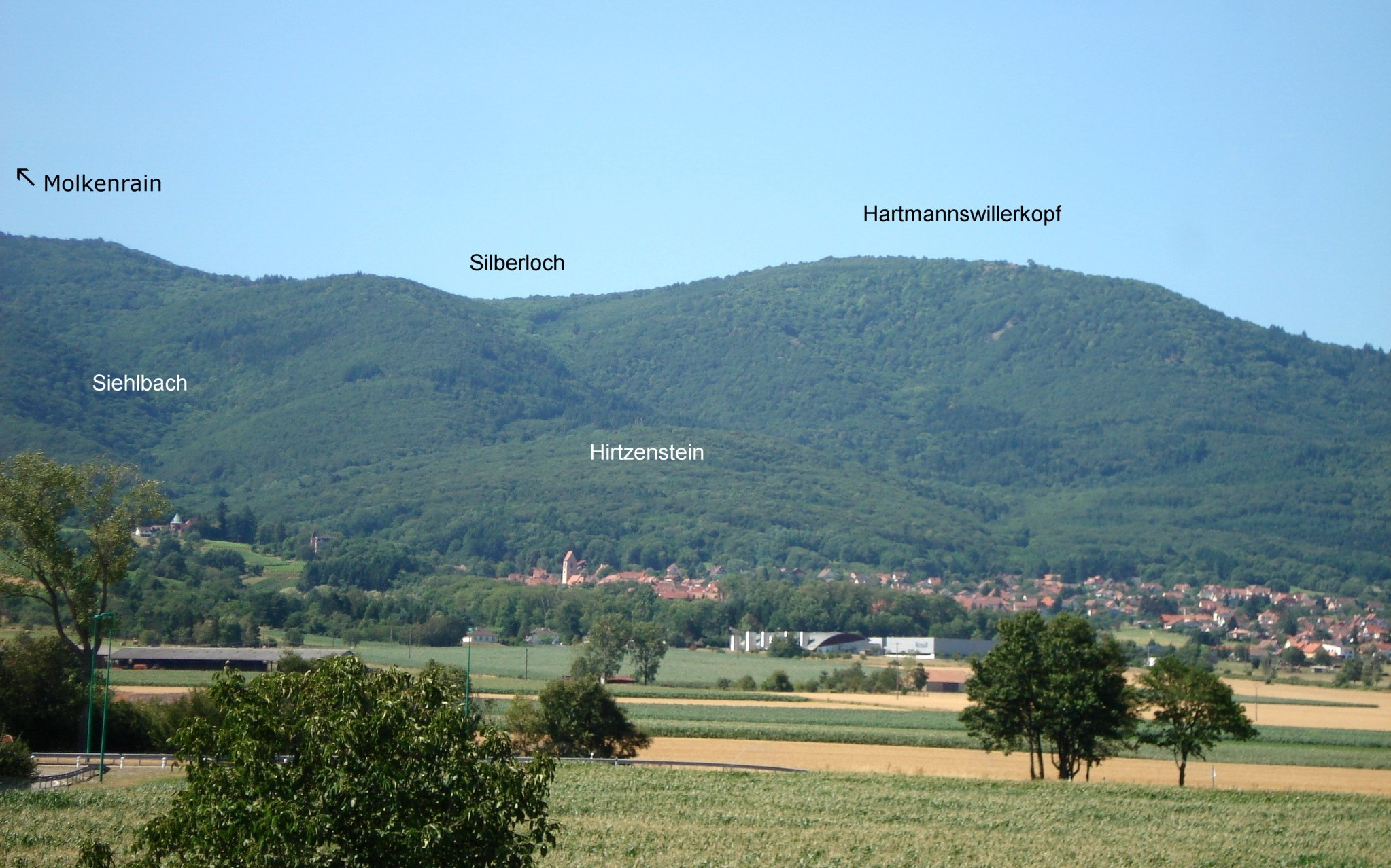 Wattwiller Vue paysagère